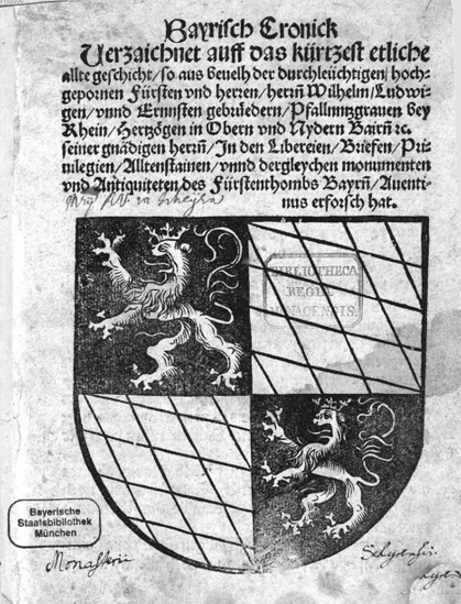 Buchdruck, Blatt 5 der Ausgabe der Bayerischen Chronik von Aventinus mit der Abbildung des Bayerischen Löwen als Wappentier